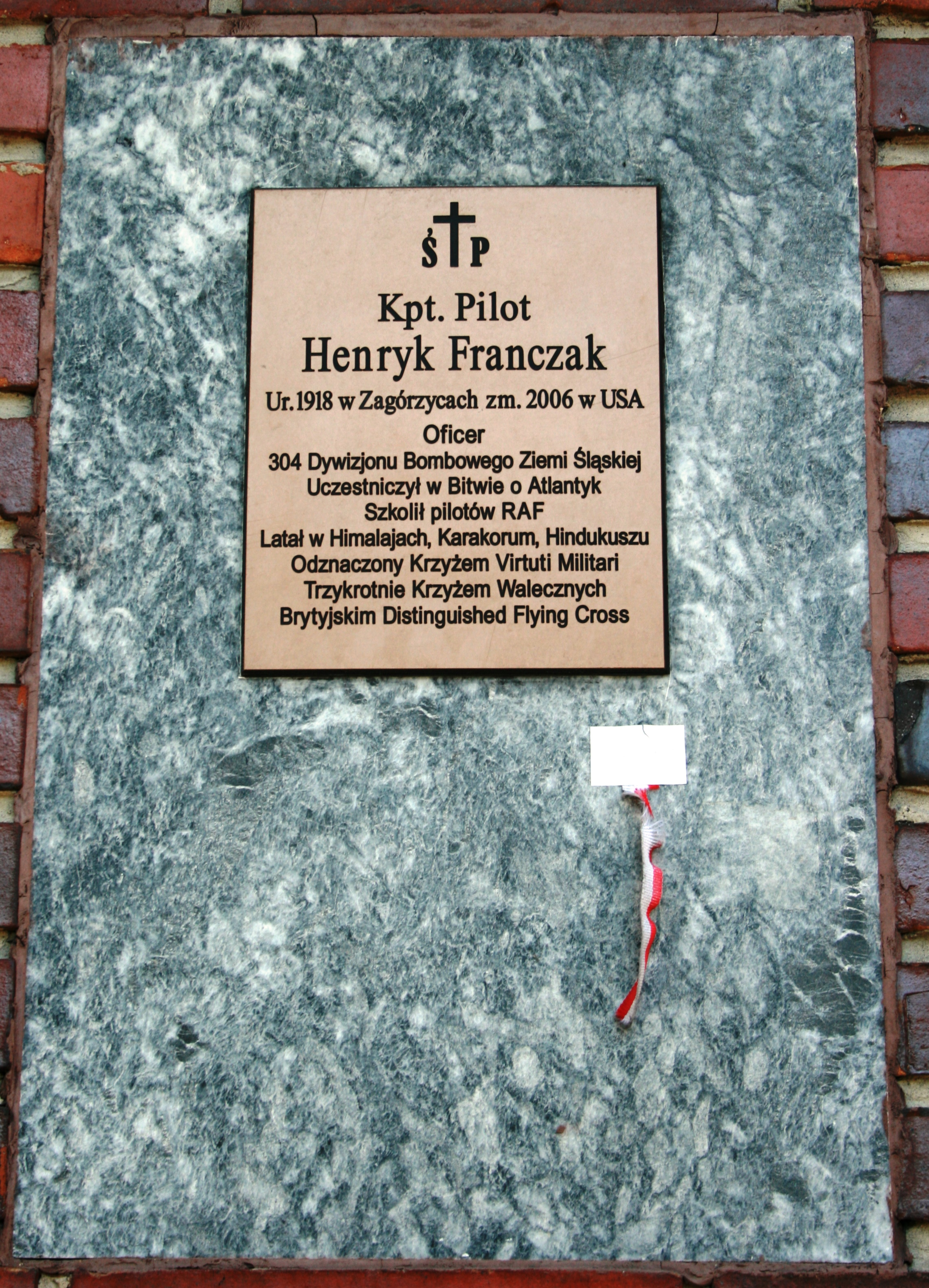 Kwatera I Samodzielnej Brygady Spadochronowej na Powązkach Wojskowych w Warszawie